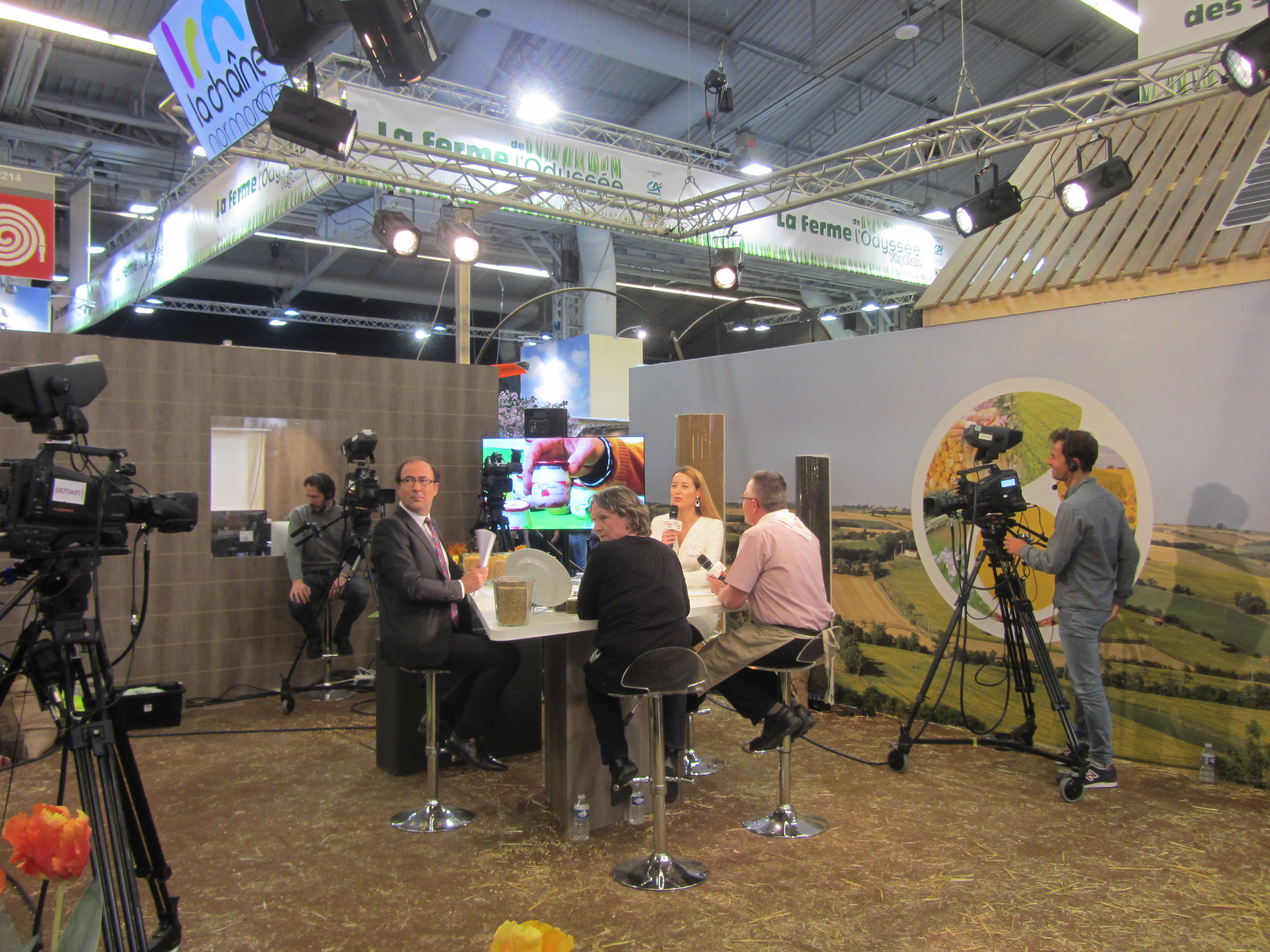 Salon de l'agriculture 2014 - Plateau de la Chaine normande This document was produced using the Canon PowerShot SX230 HS lent by Wikimedia France.